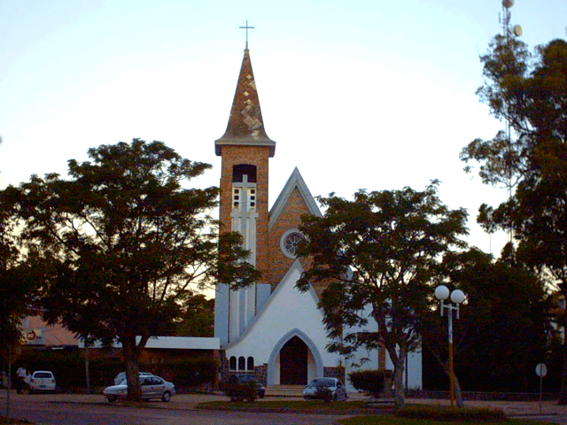 Iglesia de Atlántida, Canelones, Uruguay. No debe confundirse con otra, diseñada por Eladio Dieste, que fue una de las obras que dio notoriedad a este ingeniero, y que puede verse aqui y aqui.